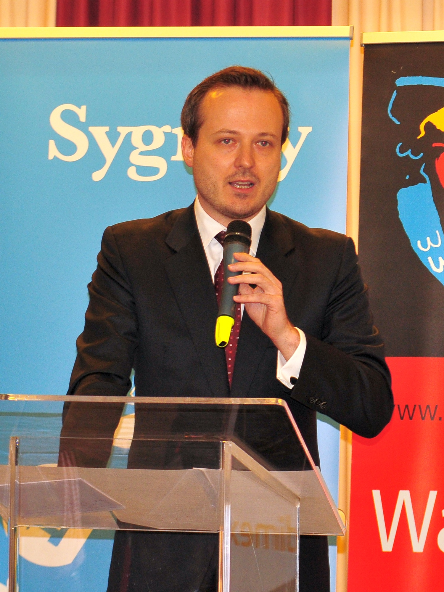 Wojciech Bartelski na otwarciu Drużynowych Mistrzostw Europy w Szachach, Warszawa 2013